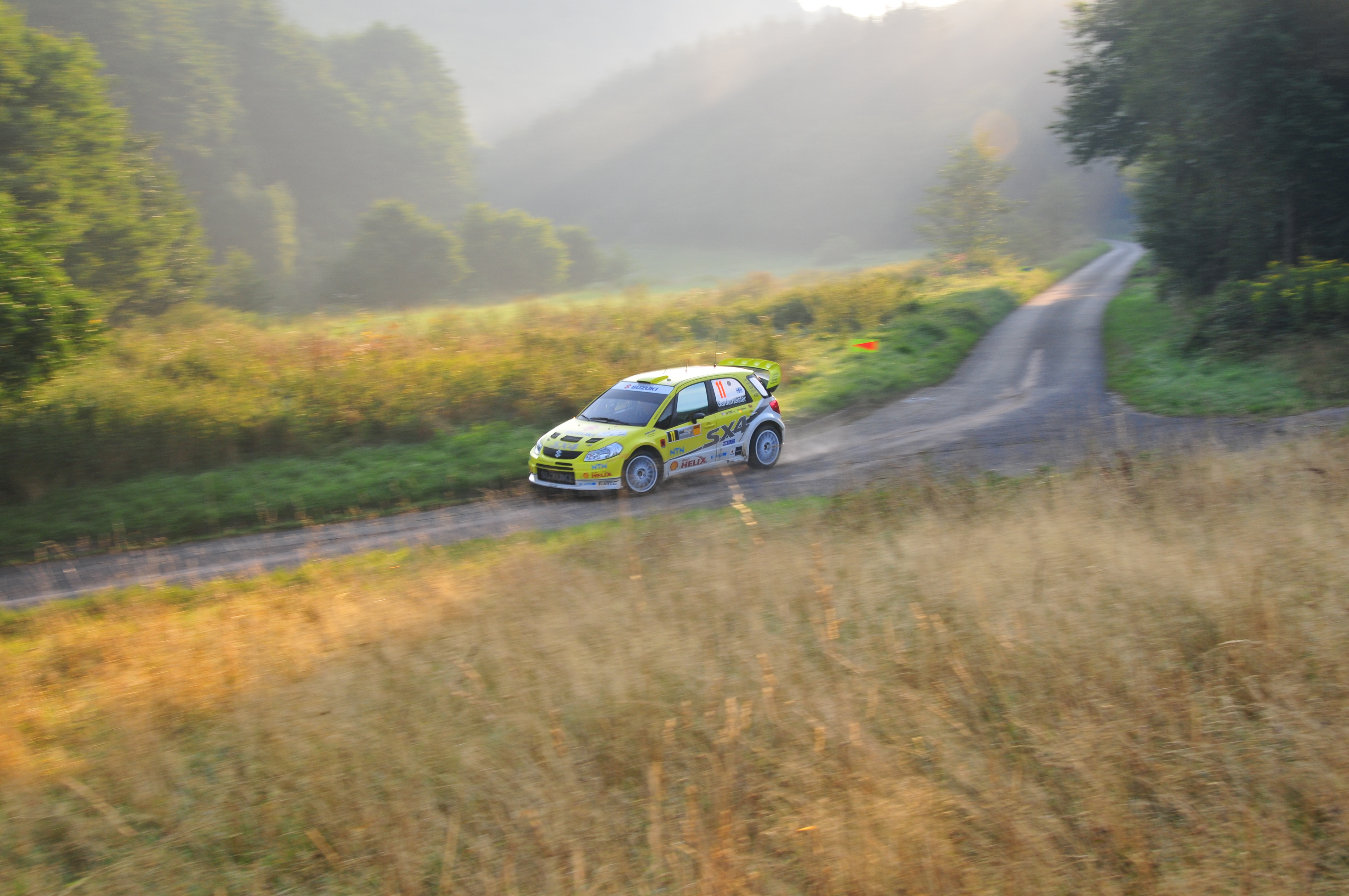 Toni Gardemeister driving his Suzuki SX4 WRC at the 2008 Rallye Deutschland.